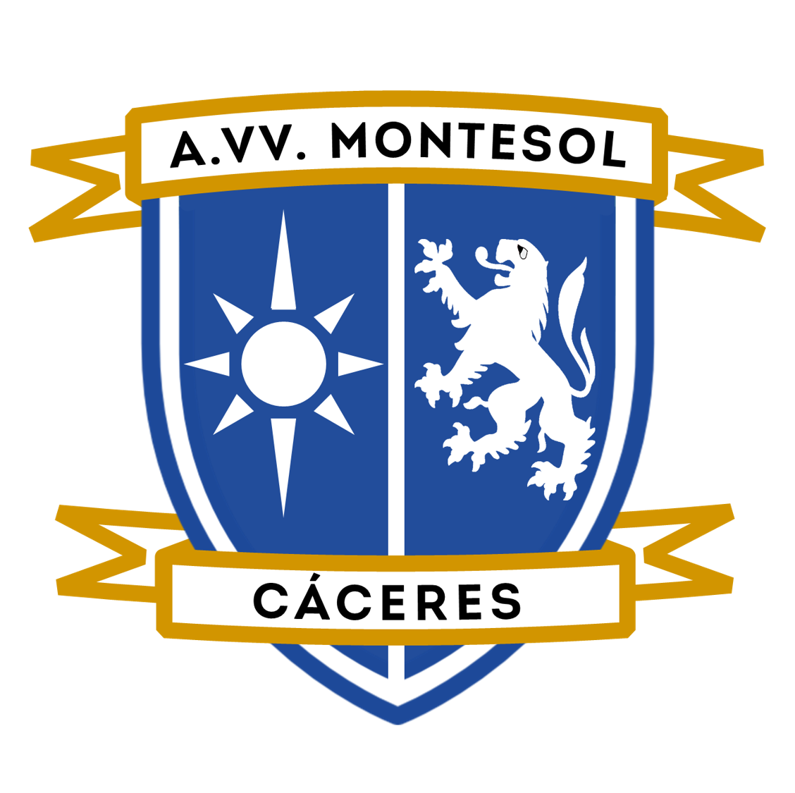 Escudo - logotipo de la Asociación Vecinal Montesol Cáceres